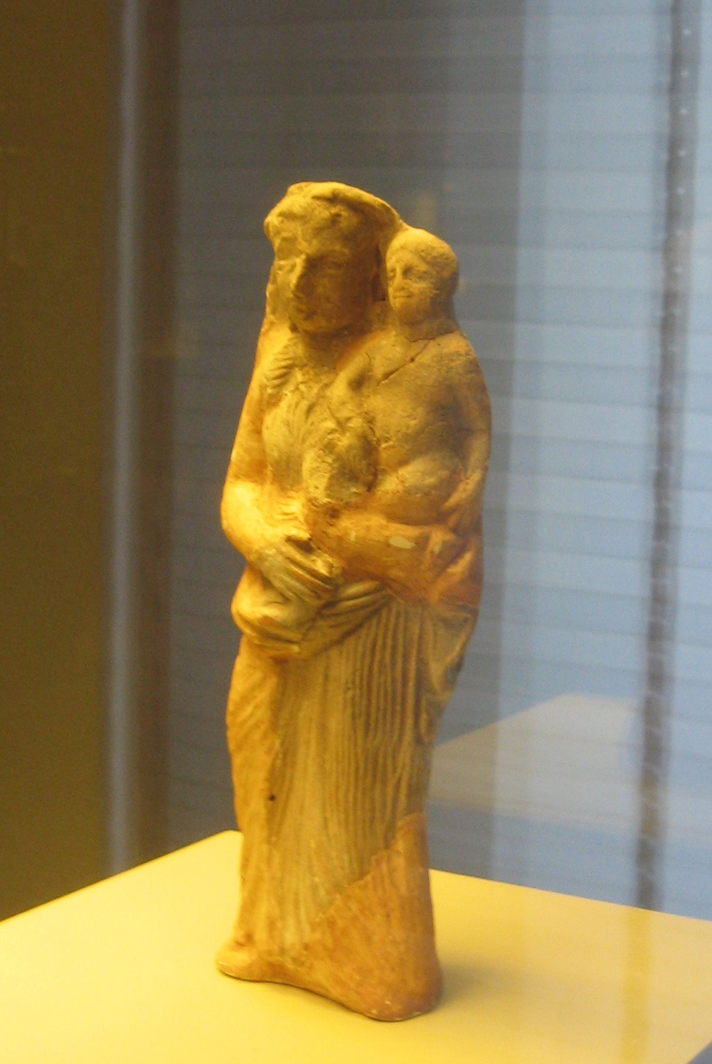 Estatuilla deidad femenina del Santuario de El Tesorillo de la Algaida, Sanlúcar de Barrameda (Cadiz-Andalucía-España)